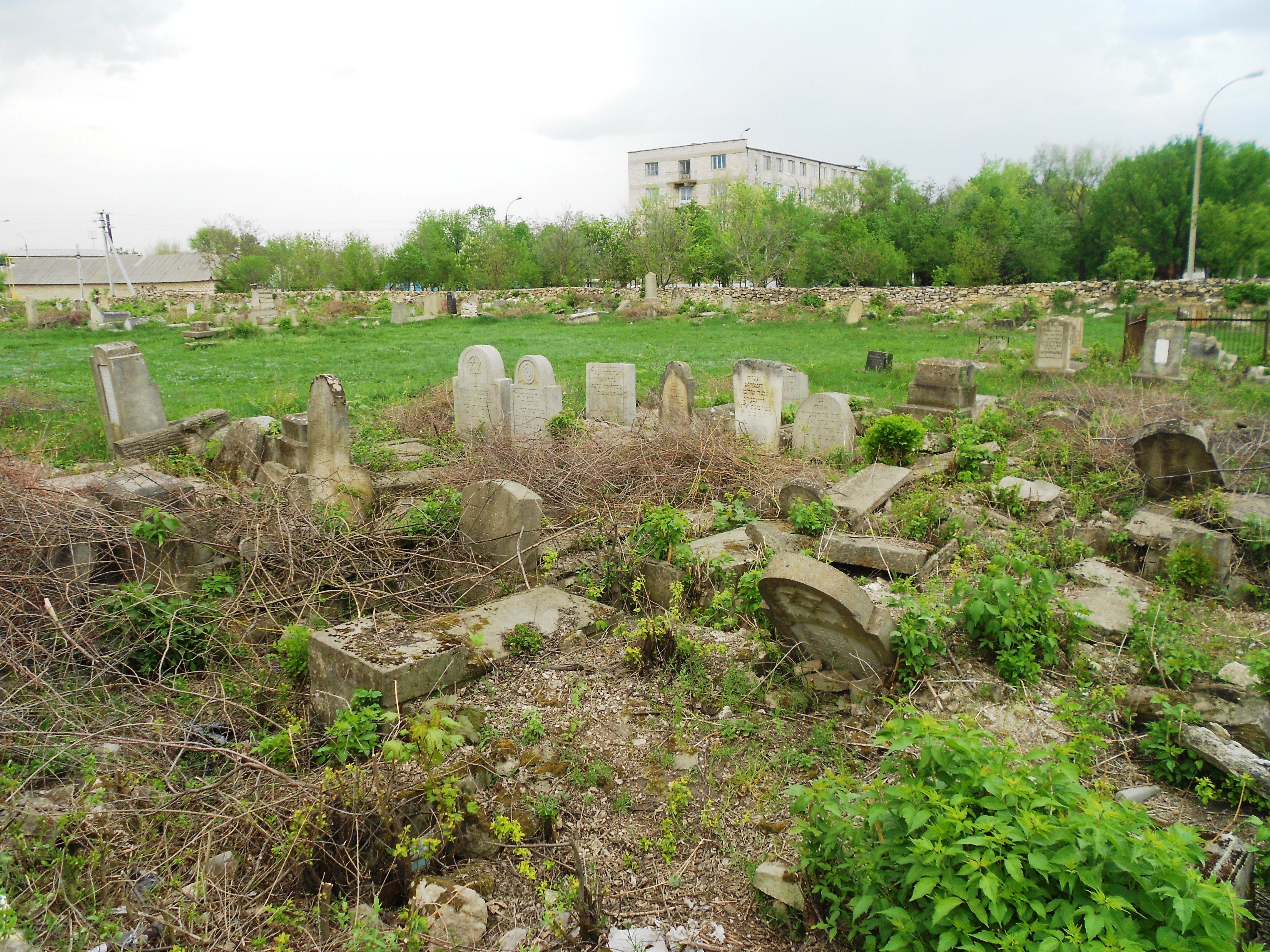 Cimitirul evreiesc din Mărculeşti